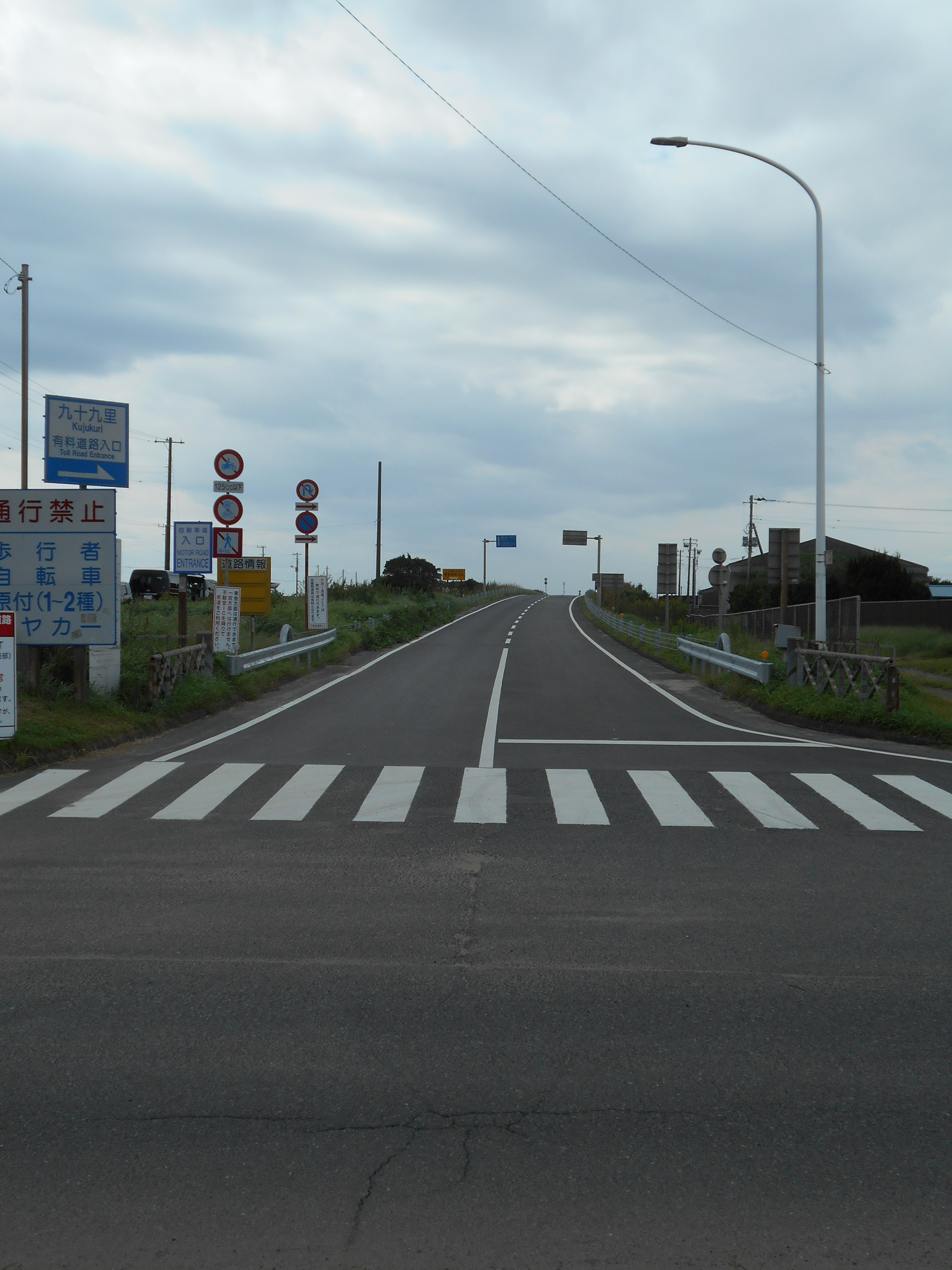 九十九里有料道路 片貝インターチェンジ